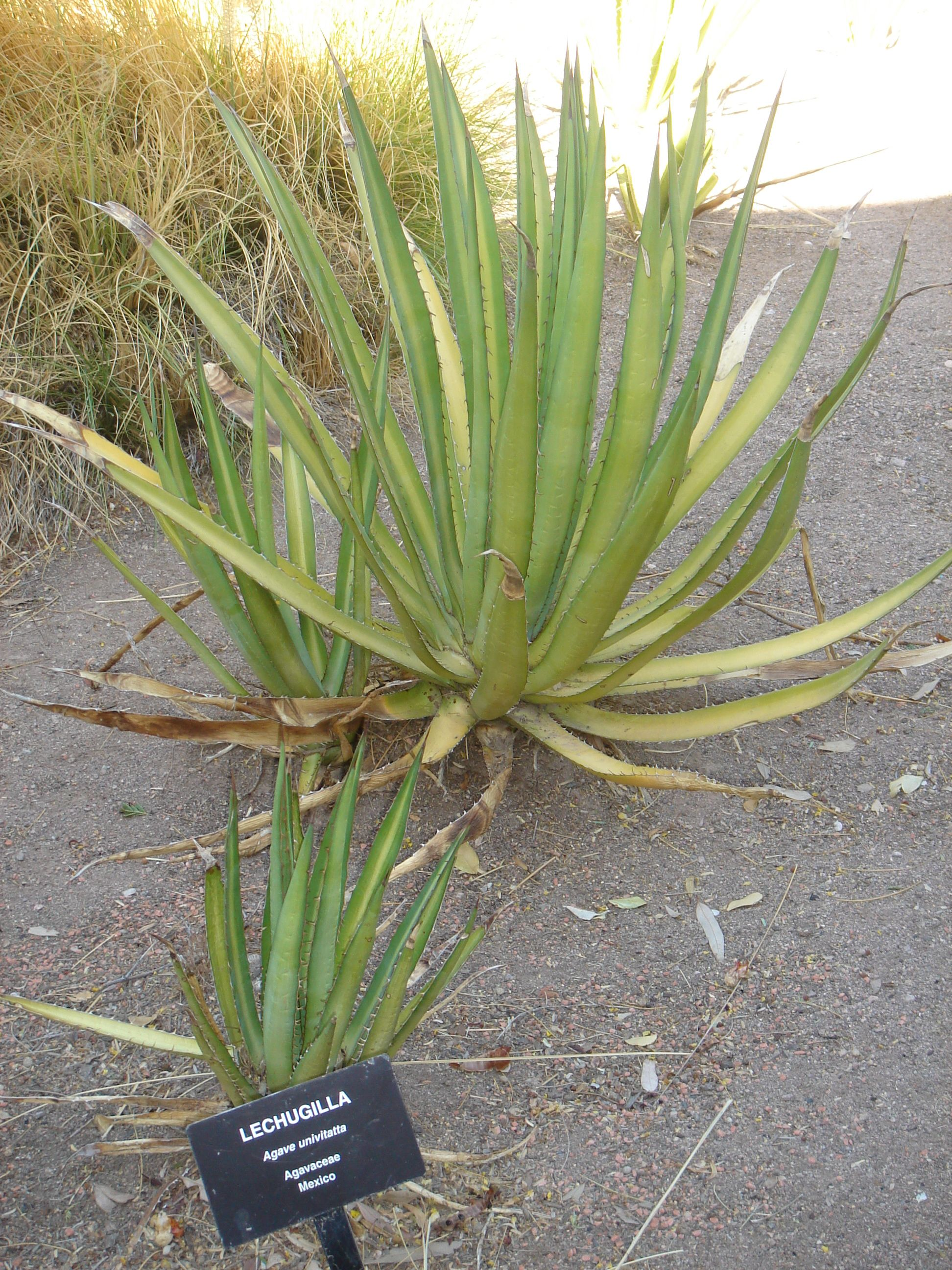 agave univitattta Lechugilla